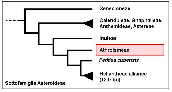 Athroismeae - Cladogramma della tribù